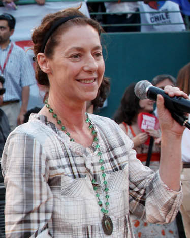 Claudia del Carmen di Girólamo Quesney (n. Santiago, 30 de diciembre de 1956) es una actriz chilena.